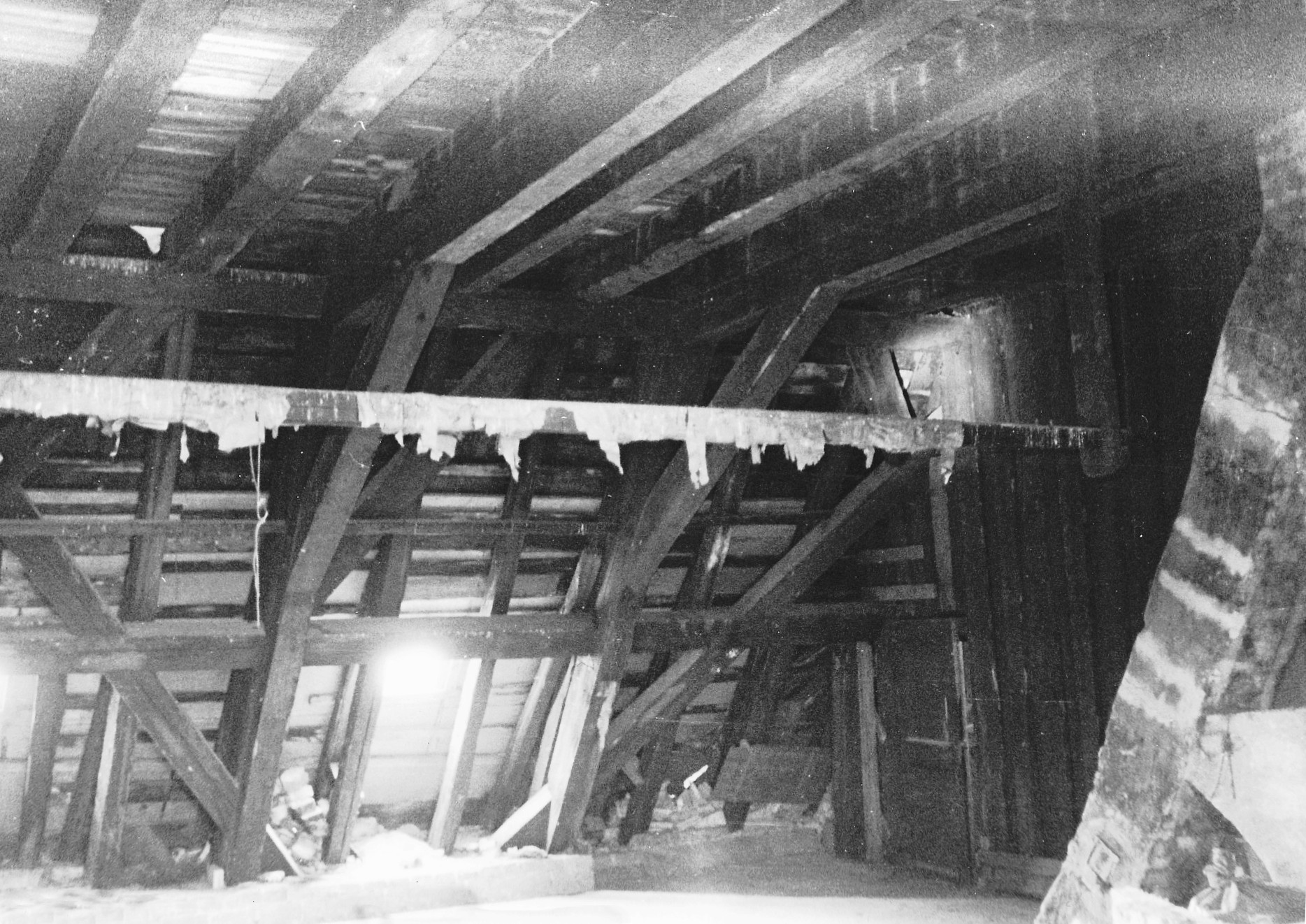 Kvarteret Cerberus 4, Gamla stan, originalvind 1640-tal